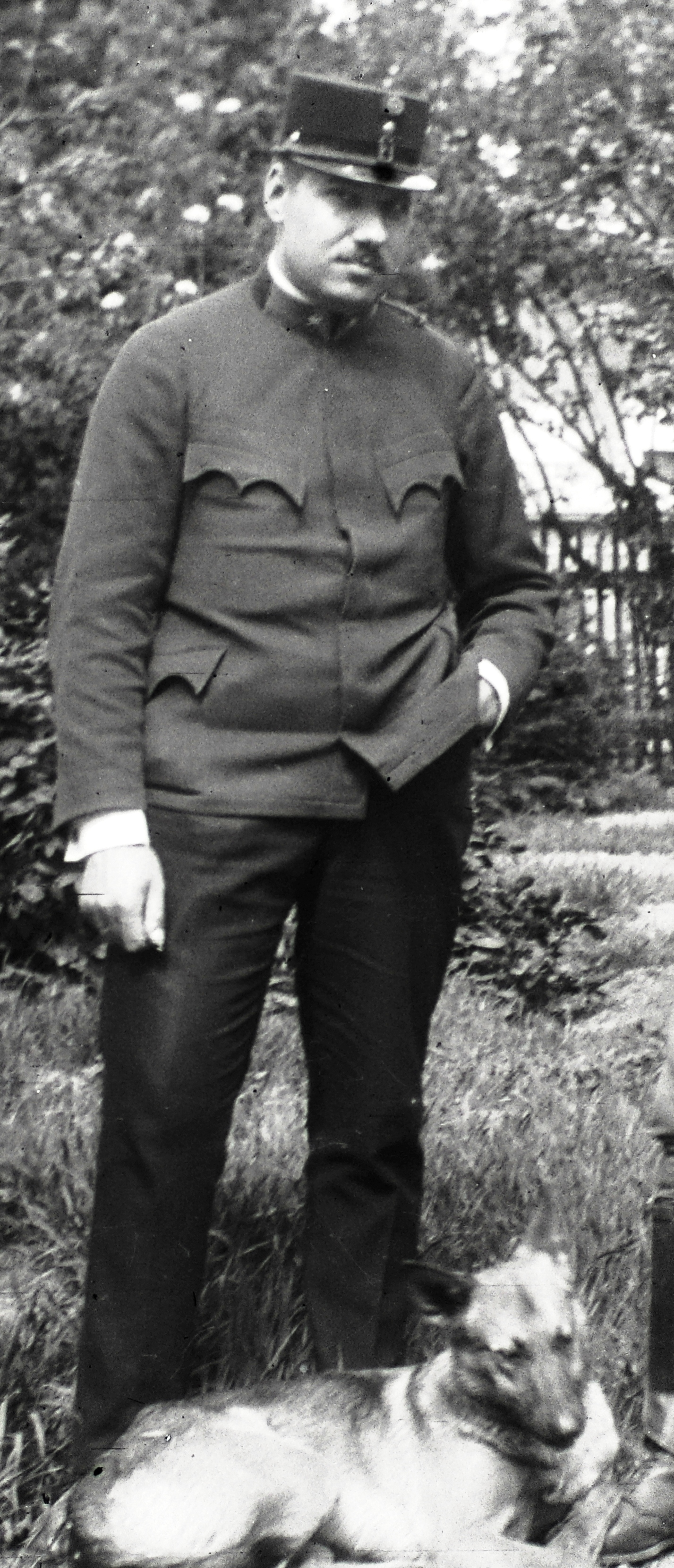 Poppe Kornél alezredes, léghajóparancsnok.